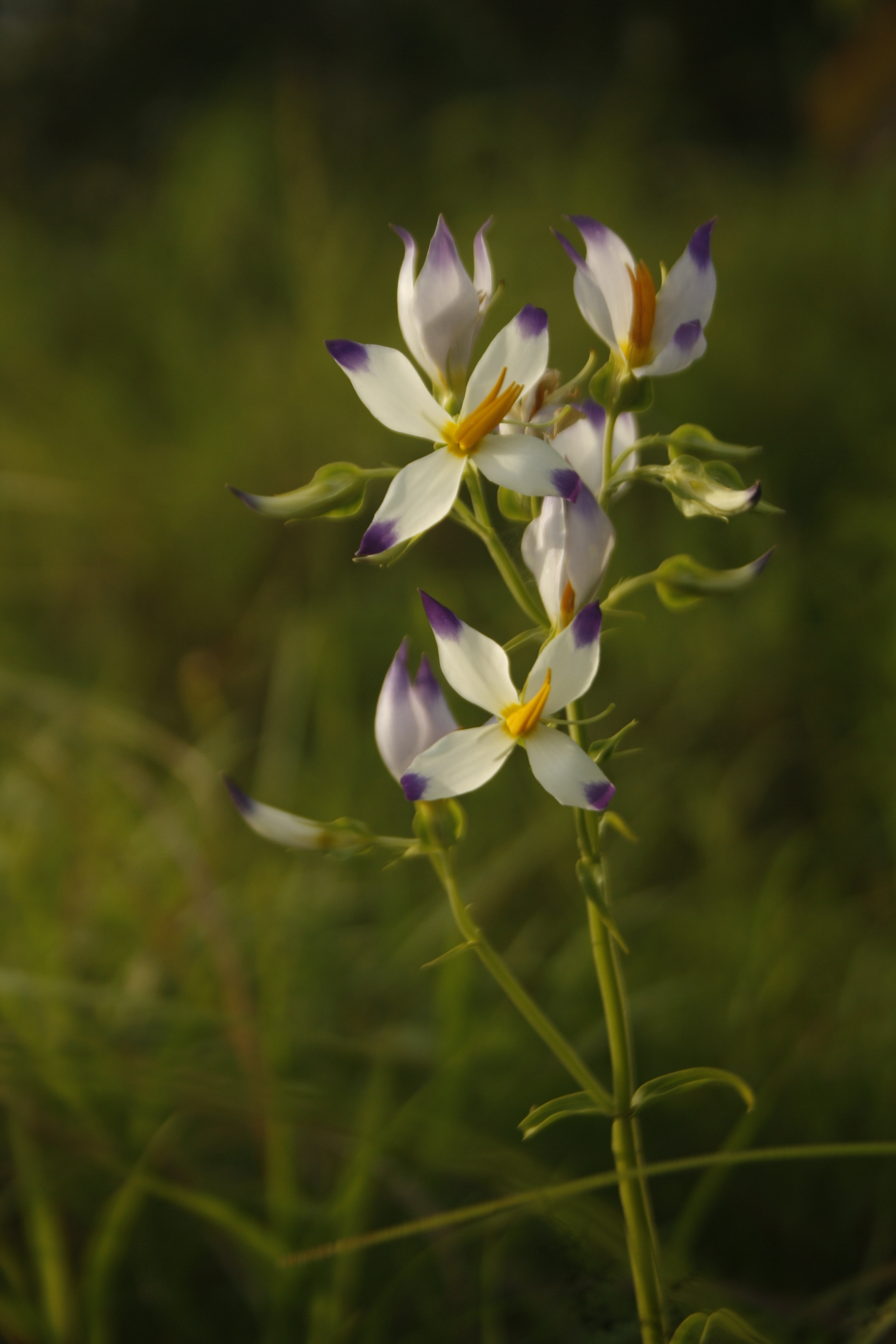 പാലക്കയം തട്ട്